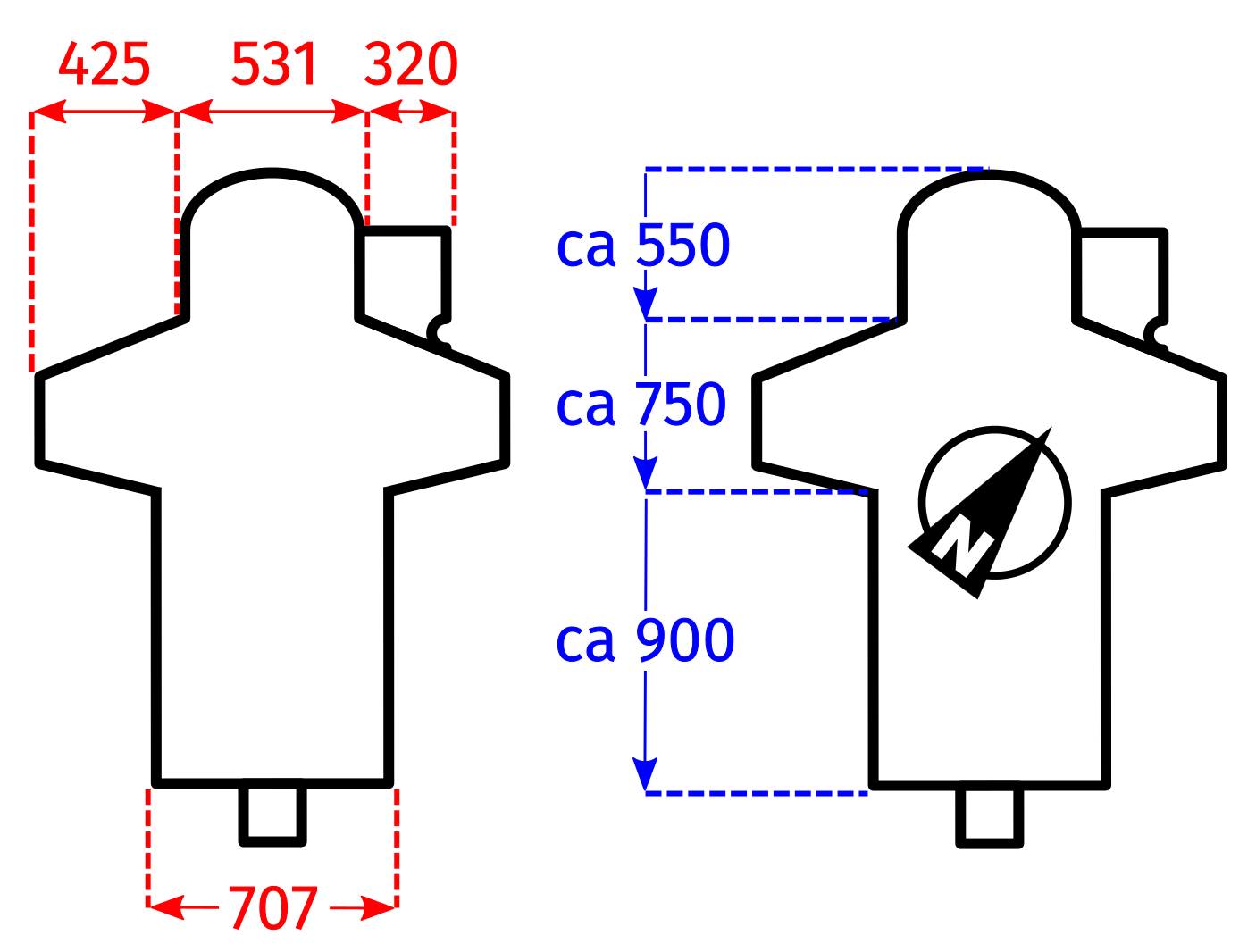 Längen- und Breitenangaben bez. Heilig Kreuz (Mindelaltheim)